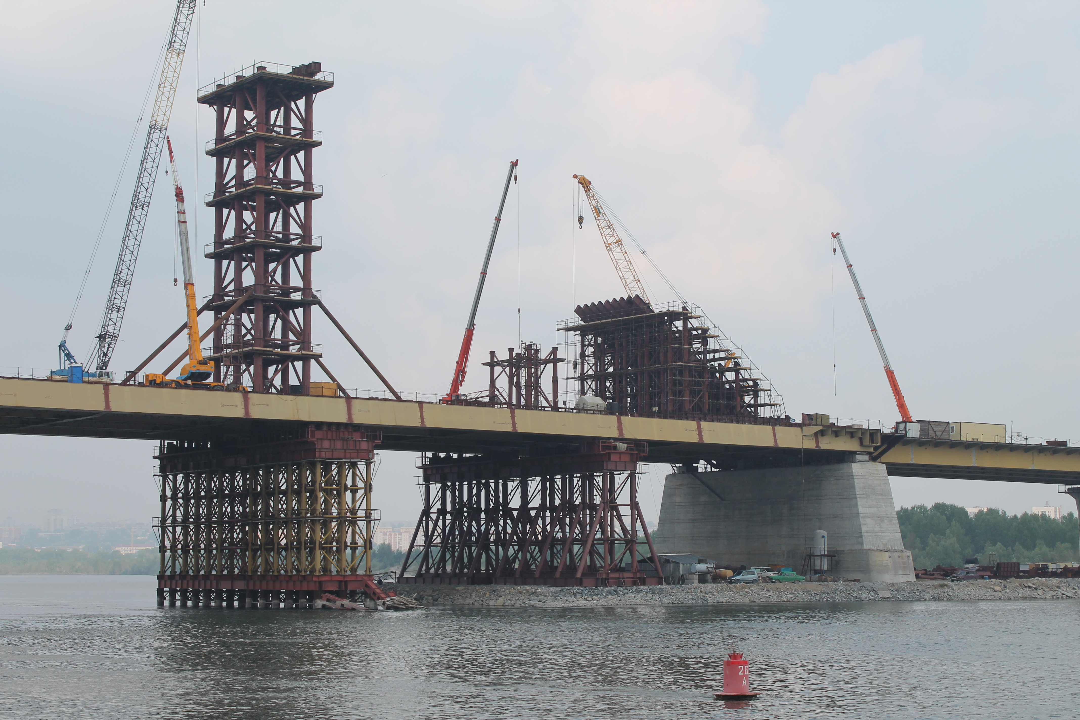 Kirovskiy rayon, Novosibirsk, Novosibirskaya oblast', Russia